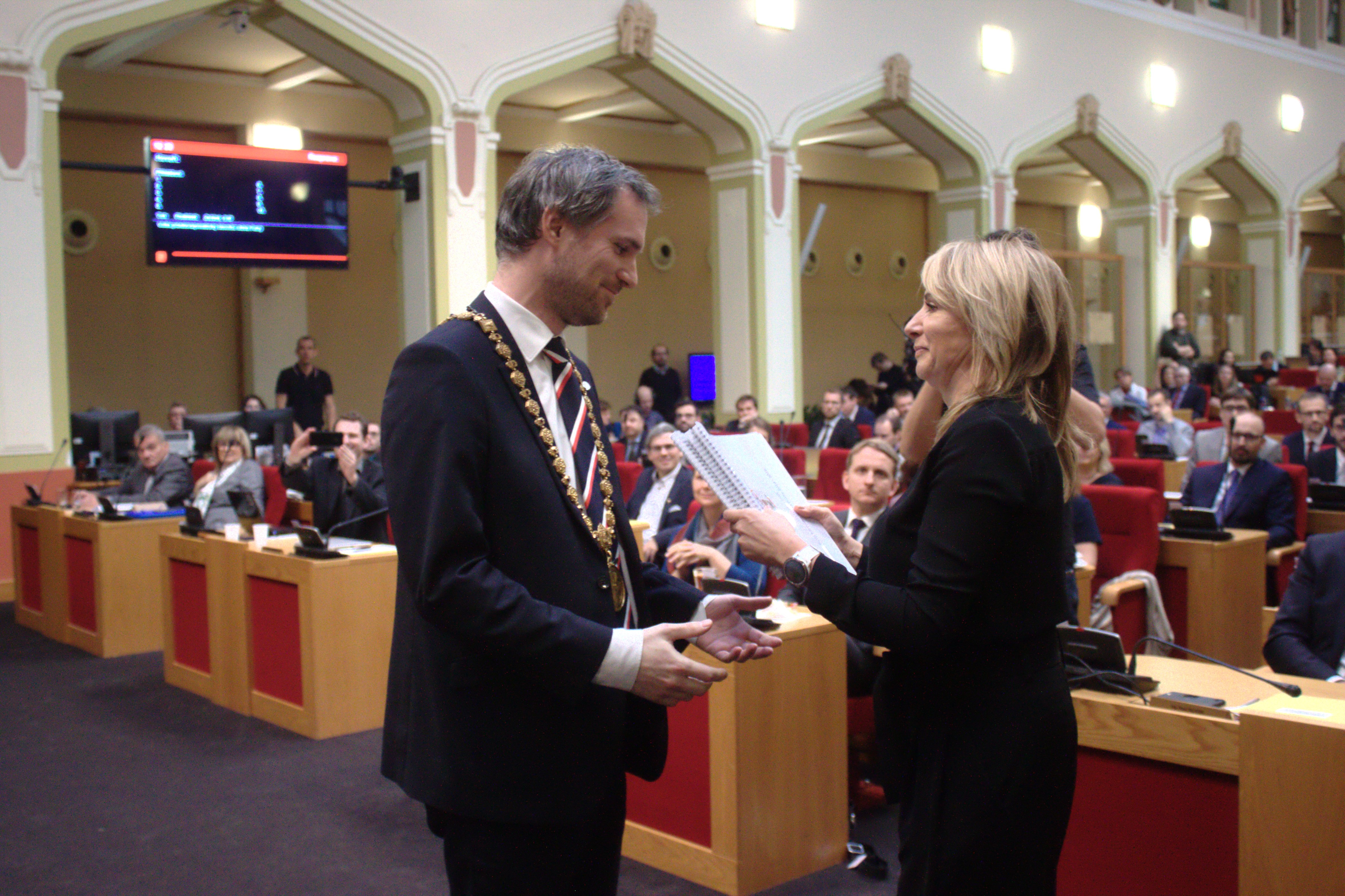 Adriana Krnáčová předávající dokumenty Zdeňku Hřibovi na ustavujícím zasedání pražského zastupitelstva v listopadu 2018